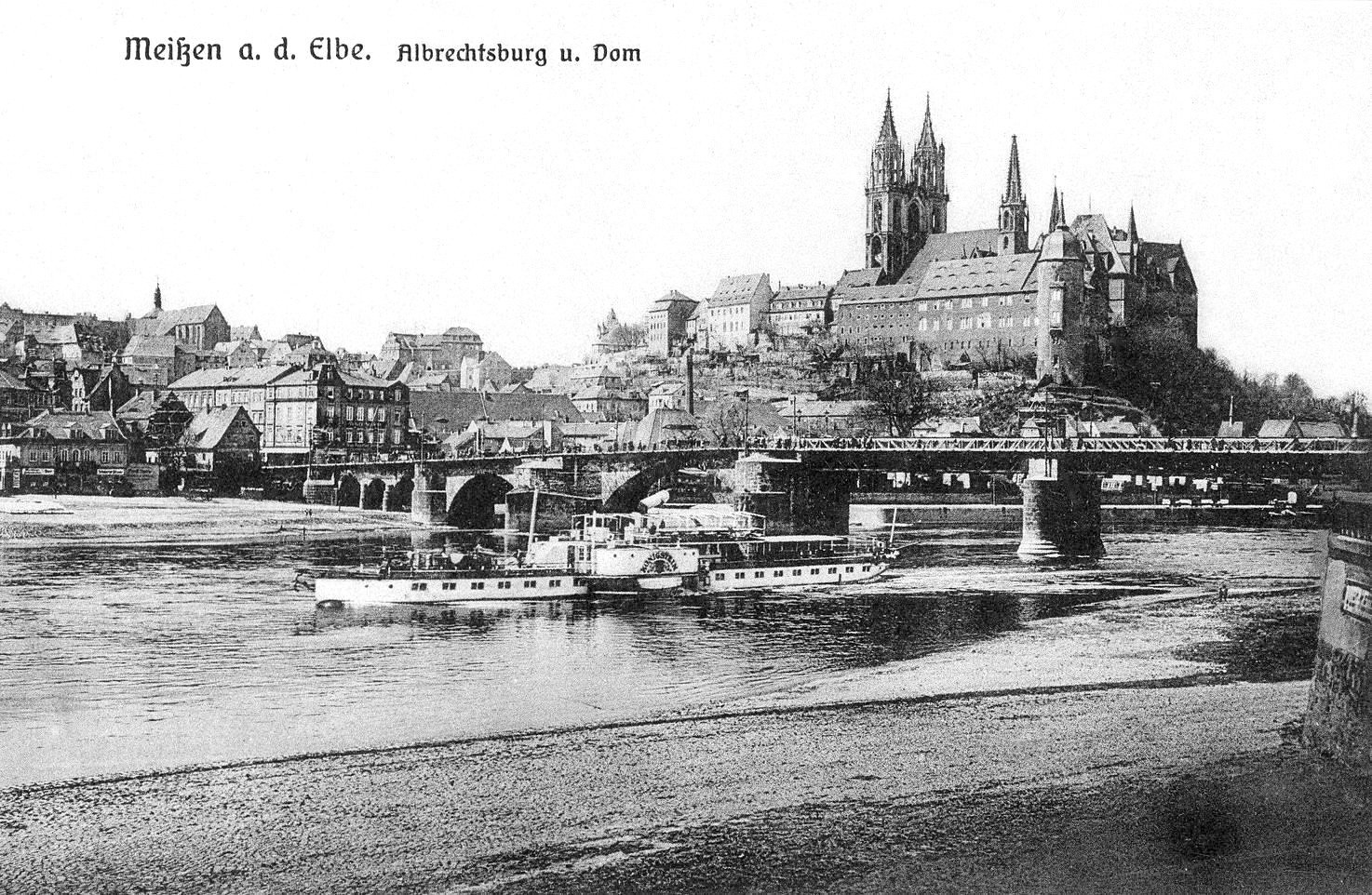 Meißen; Albrechtsburg und Dom - Elbe mit Dampfer Königstein This postcard is from publisher Brück & Sohn in Meißen ( postcard has a unique number 24862 and is available in a higher resolution at the publisher. This images was uploaded in a cooperation project between Wikipedians and the publisher.